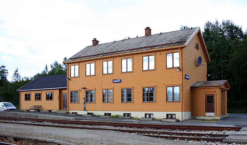 Template:Majavatn stasjon, Nordlandsbanen. Bygd 1939. Arkitekt: Bjarne F. Baastad.